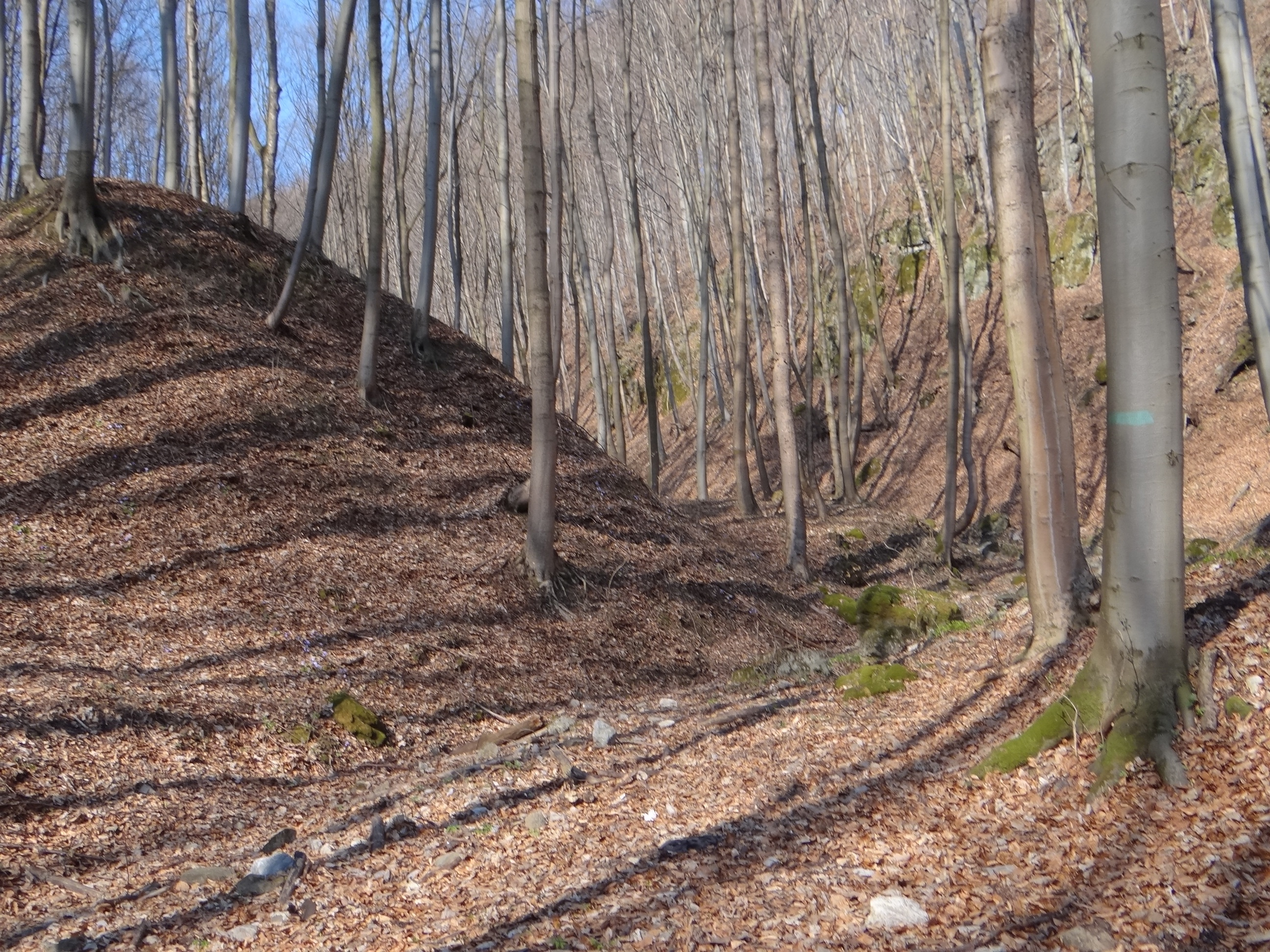 Wąwóz Zbrza w Dolinie Racławki